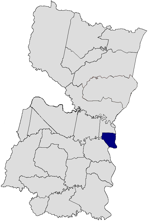 Presidente Franco en Alto Paraná